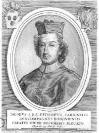 Ritratto del cardinale Giacomo Boncompagni (1652-1731)